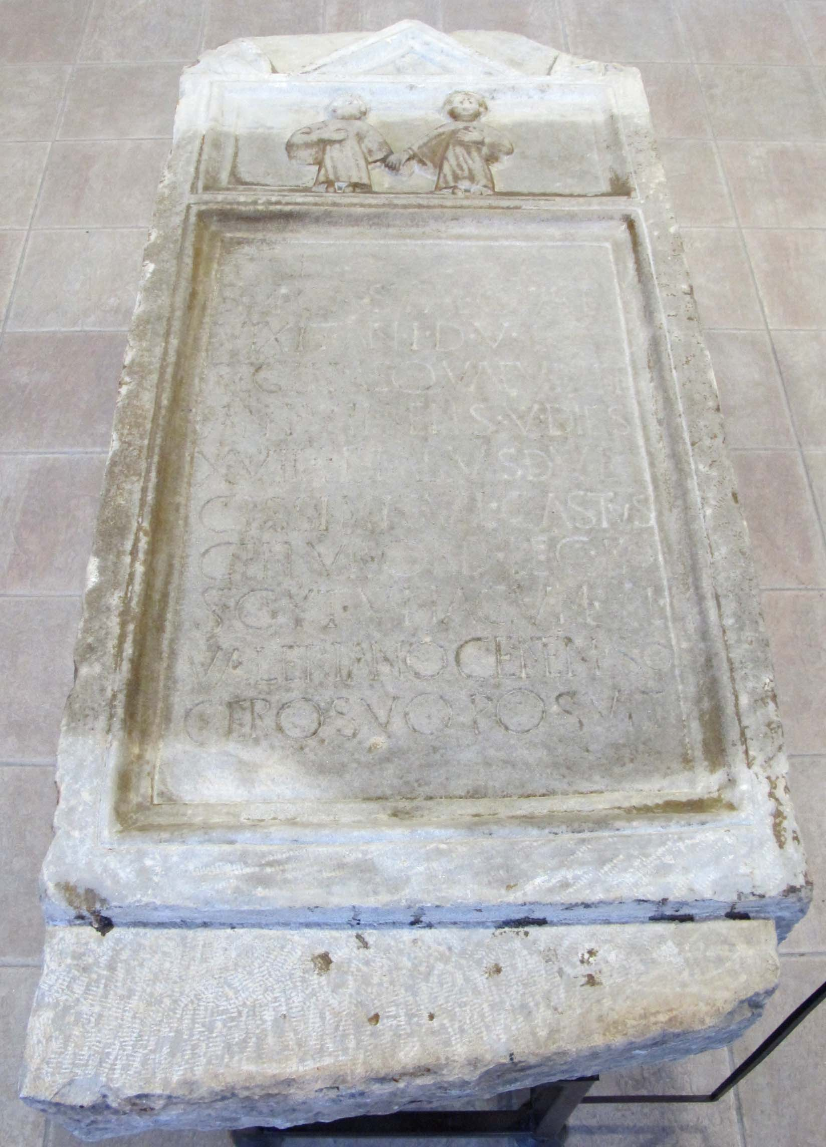 Carsium, stele funeraria, III-IV sec. AE 1989, 641 = AE 1990, 866: D(is) M(anibus) / b(ene) m(erentibus) Castae quae / vixit an(num) I d(ies) V et / Reginae quae vixit / ann(os) VII mens(es) V dies / XVIII filiabus dul/cissimis Val(erius) Castus / centur(io) ord(inarius) leg(ionis) I Iov(iae) / Scyt(hicae) una cum Val(erio) / Valeriano centen(ario) so/cero suo posuit